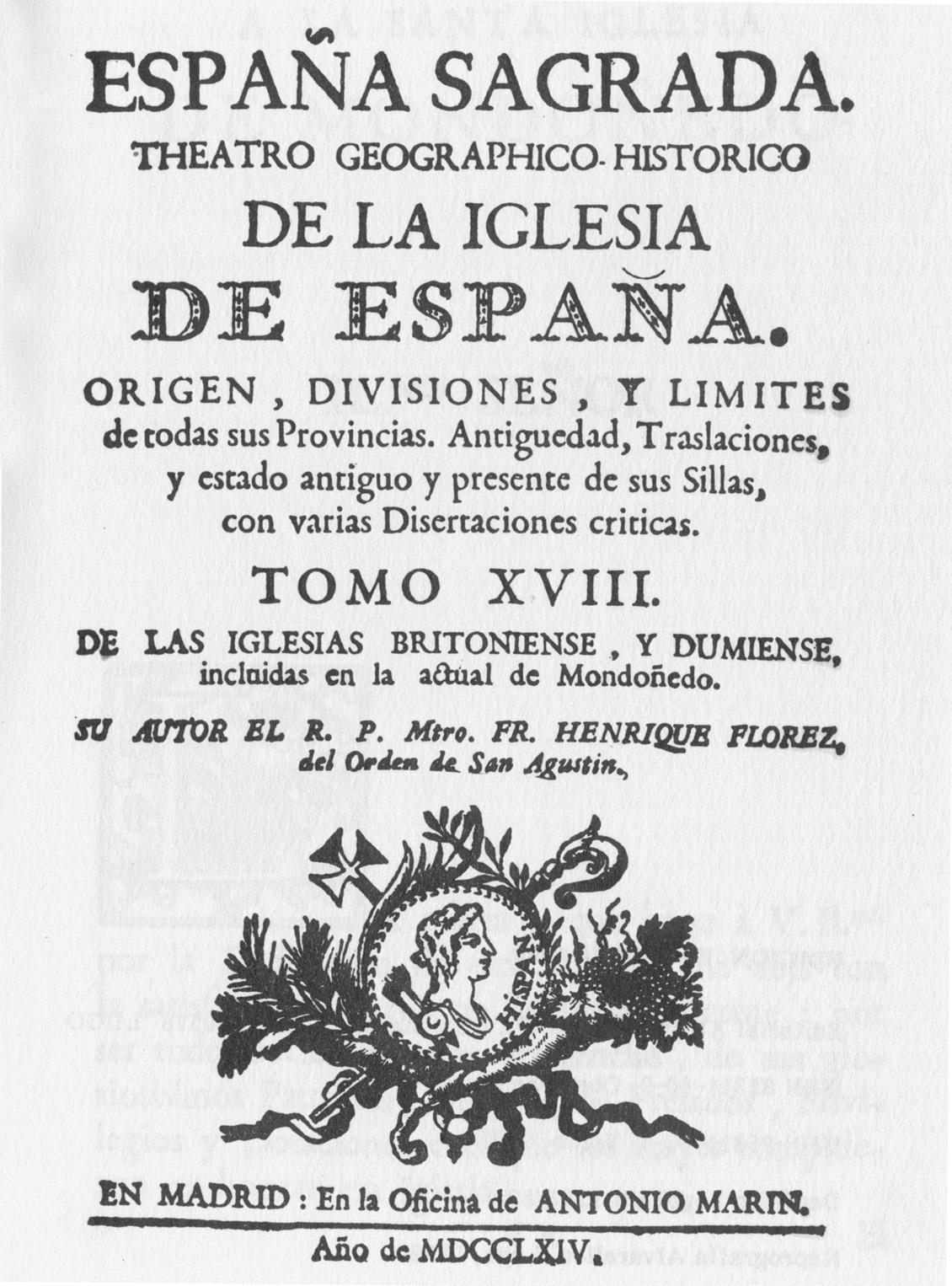 Portada del tomo XVIII de la España sagrada, de Enrique Flórez.